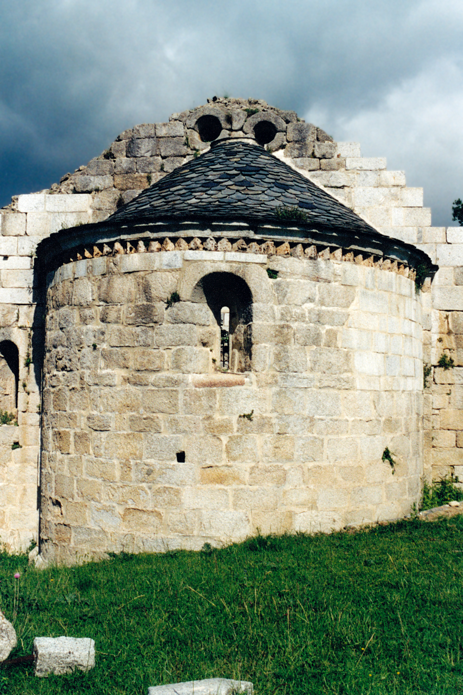 France - Pyrénées Orientales - Vallespir - Église Saint-Martin de Corsavy